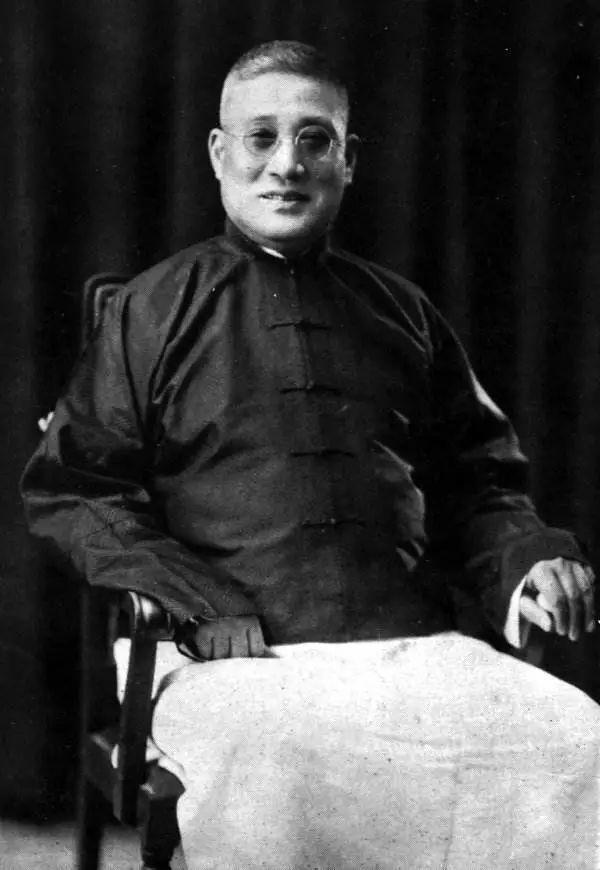 张伯苓,南开学校创始人,教育家